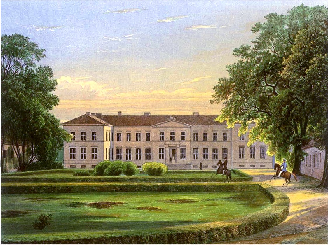 Schloss Neuhardenberg, Lithografie aus dem 19. Jahrhundert